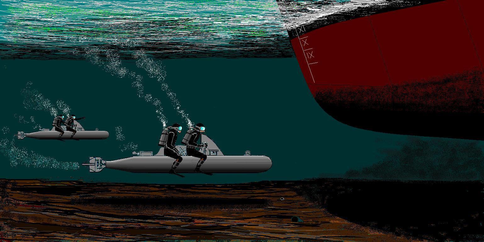 Maiale menselijke torpedo-onderzeeër